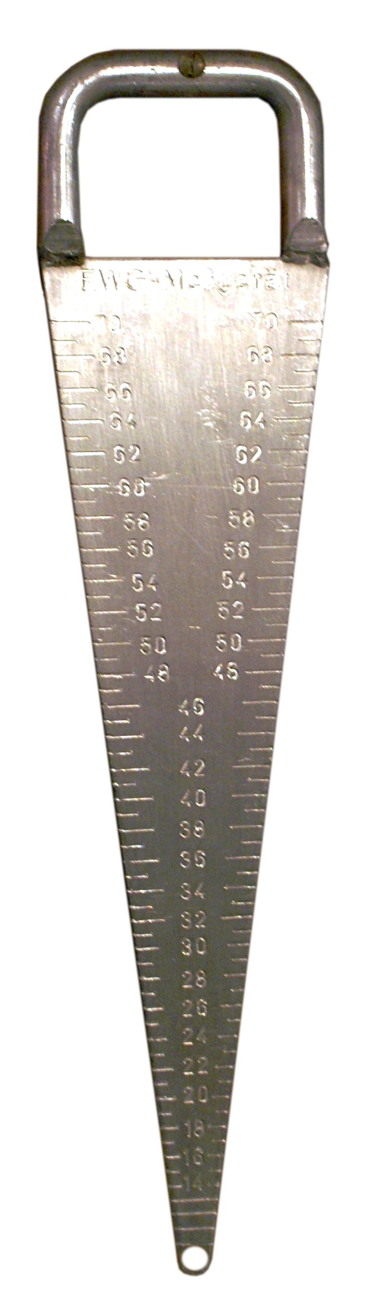 Maschenprüfgerät im Deutschen Zollmuseum Hamburg. Es ist kein Meß- sondern ein Prüfgerät.